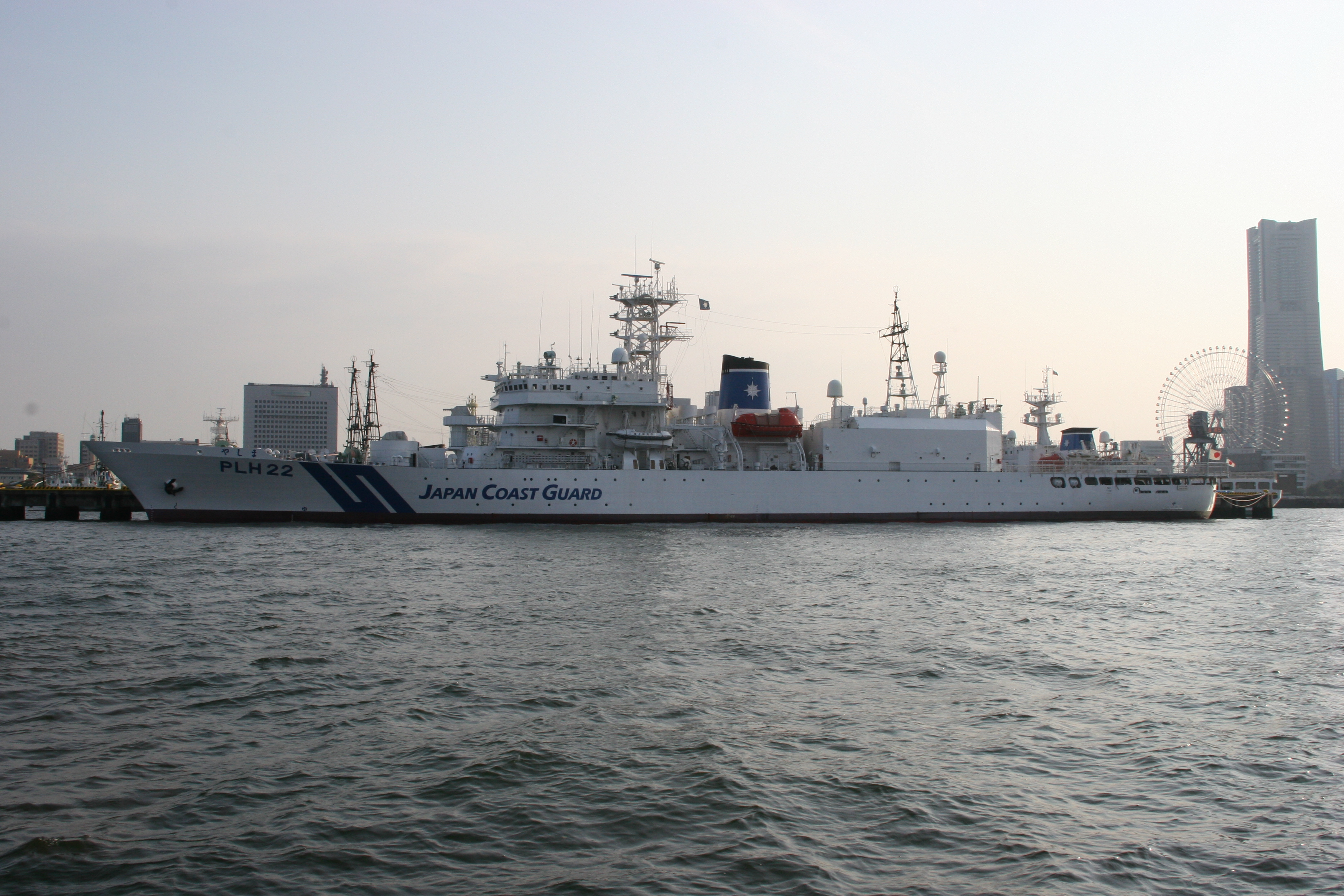 第3管区海上保安本部（横浜海上防災基地）に停泊する巡視船やしま